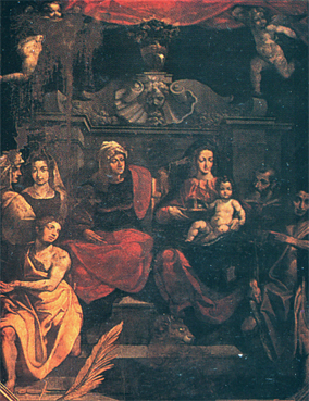 El lienzo representa a Santa Ana junto con su hija, la Virgen María, y el Niño Jesús.